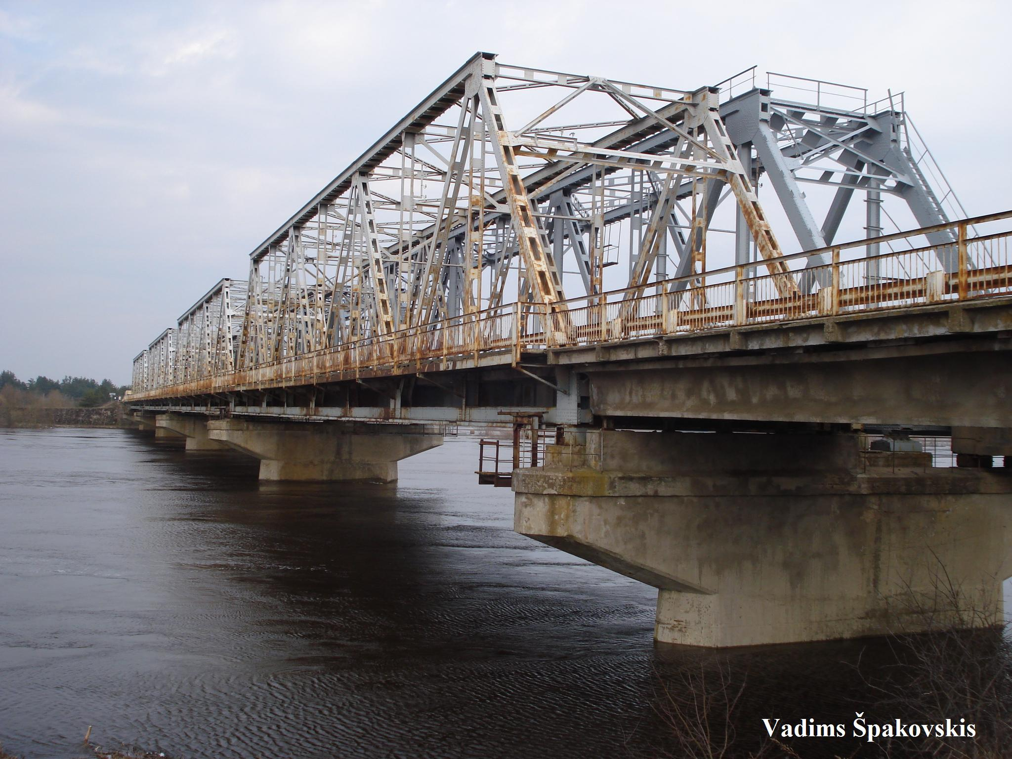 Свентский мост через Даугаву